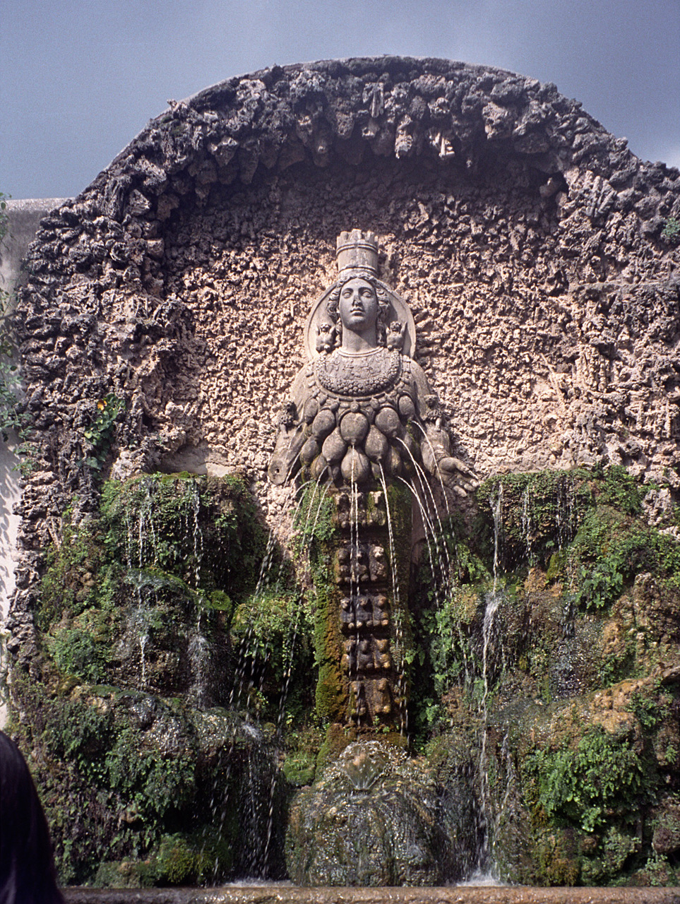 Villa d'Este, Tivoli